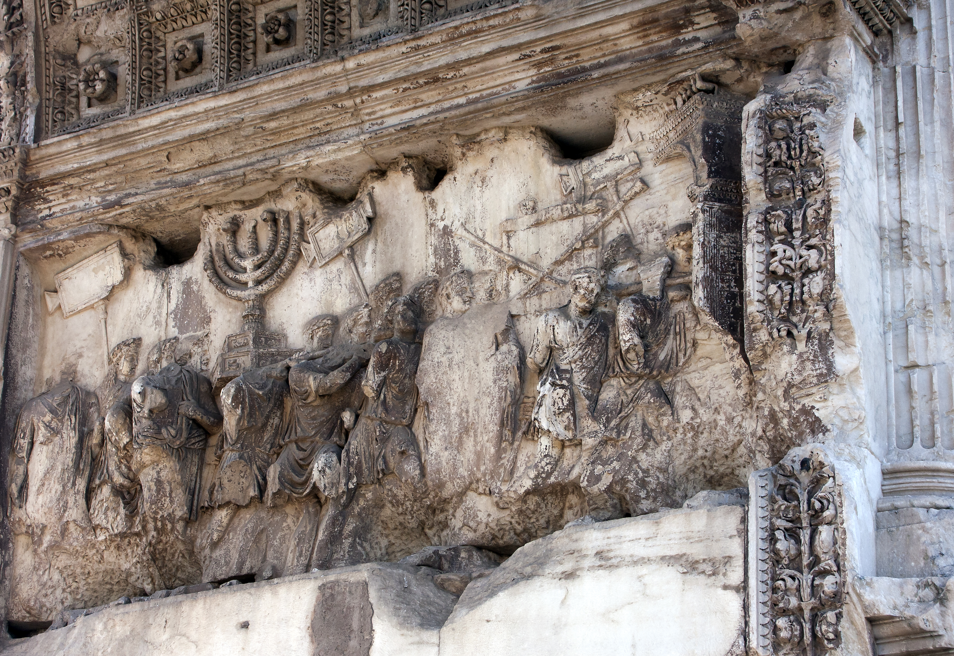 Romarnas triumftåg efter judiska kriget.